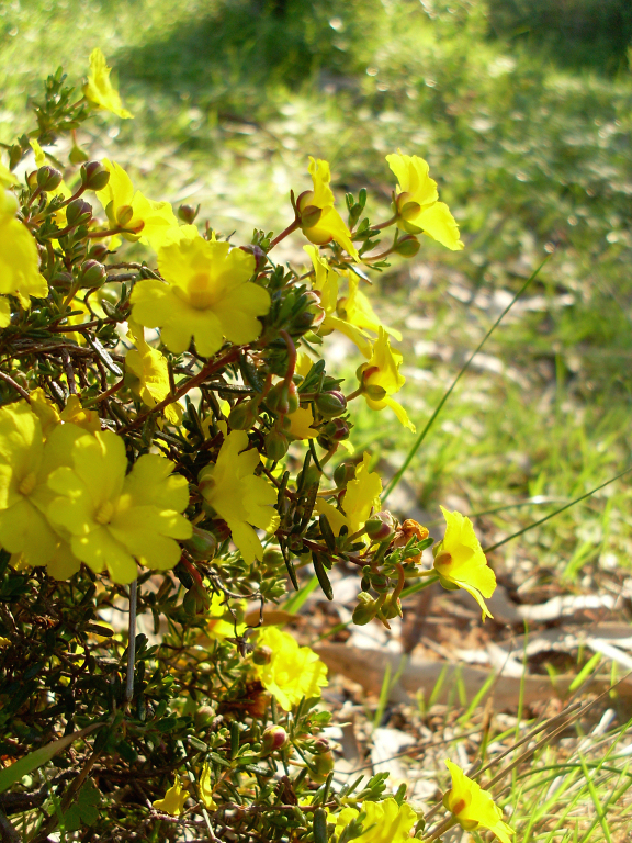 Hibbertia